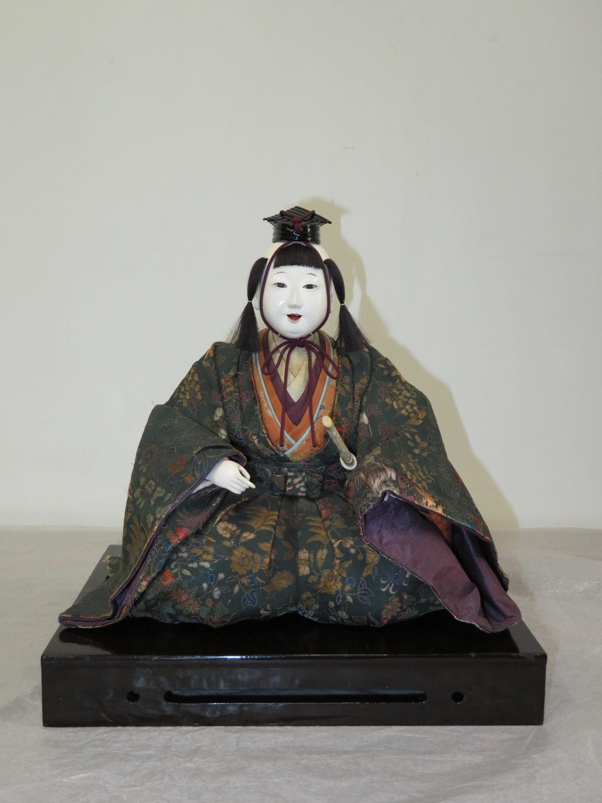 2018年2月27日-3月18日 東京国立博物館展示風景